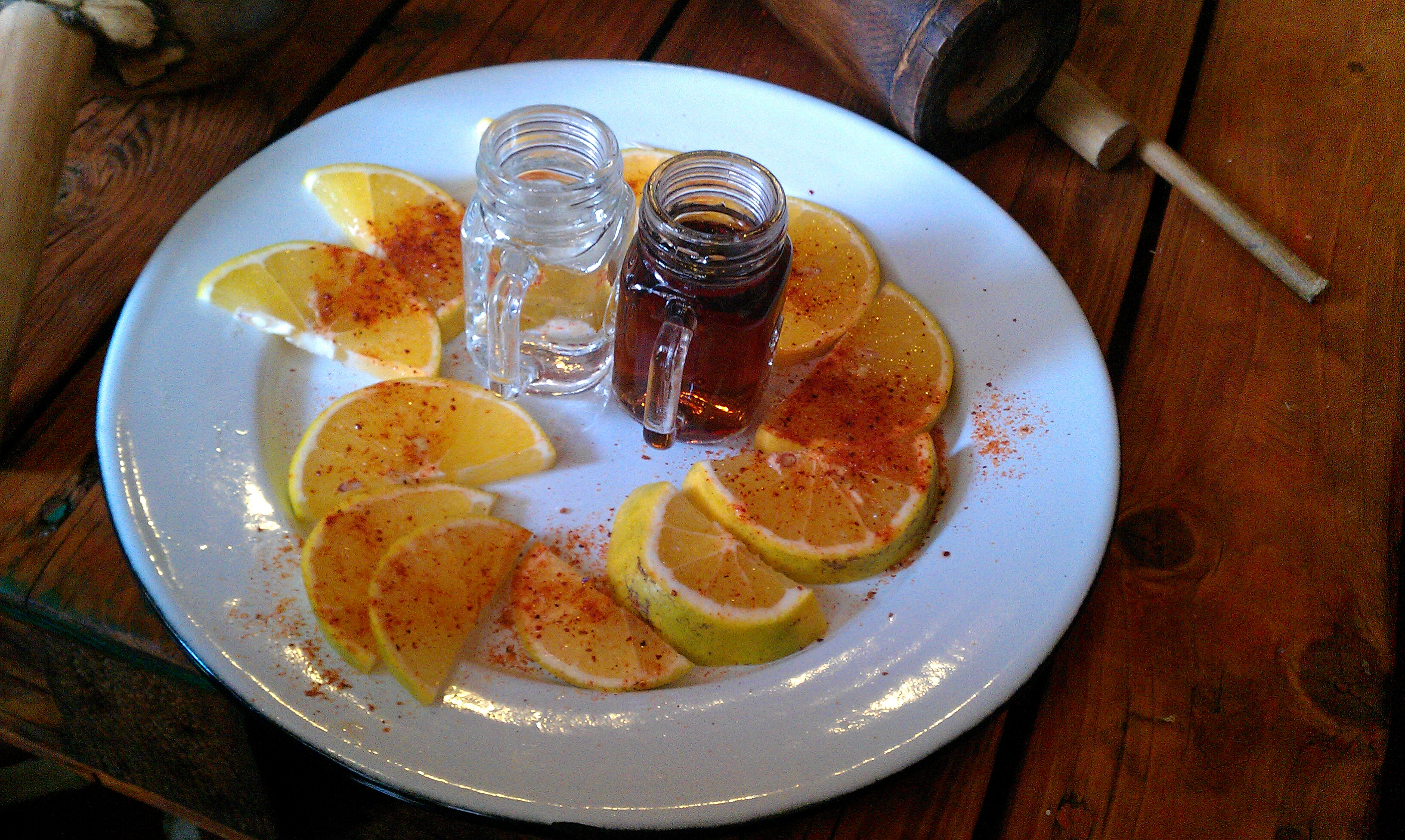 Bicchierini contenenti mescal blanco (bianco, più giovane) e añejo (invecchiato), serviti con fette di arancia e sal de gusano (letteralmente "sale di verme") composto di sale, peperoncino e larve sbriciolate. Foto scattata a Tepoztlán, nello stato di Morelos, in Messico.